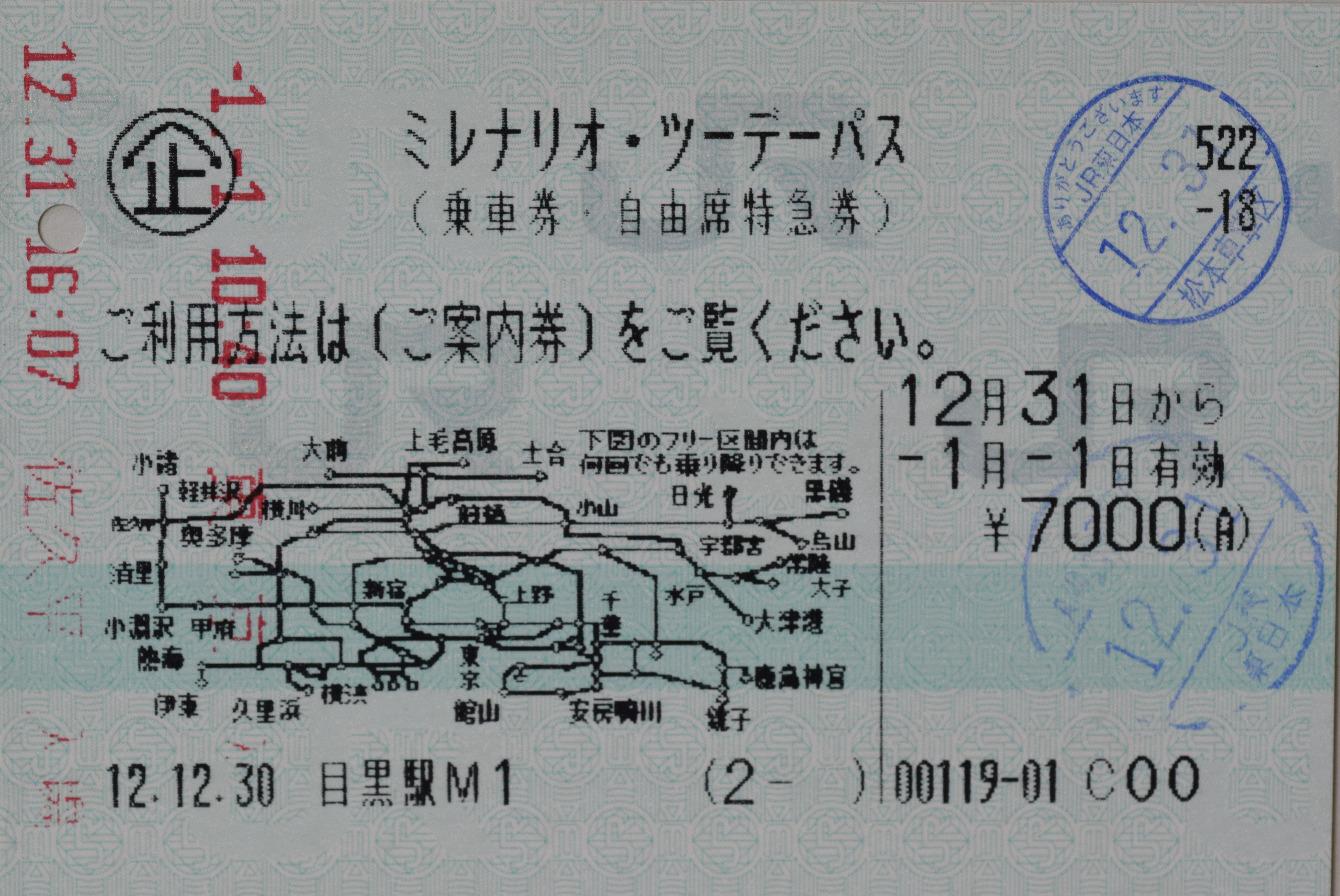 2000-2001年のミレニアムに合わせて平成12年12月31日の大晦日～平成13年1月1日の元日にかけてのみ有効だったJR東日本のミレニアム・ツーデーパス